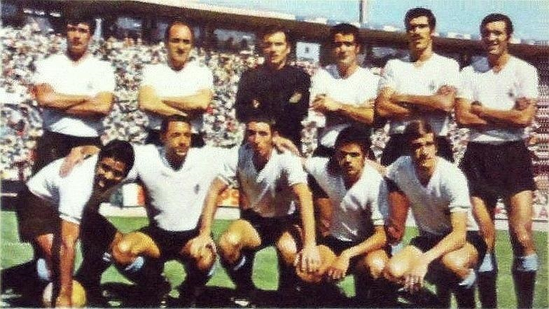 L'équipe d'Uruguay de football en 1970 - Campioni dello Sport 1970-1971, n°82